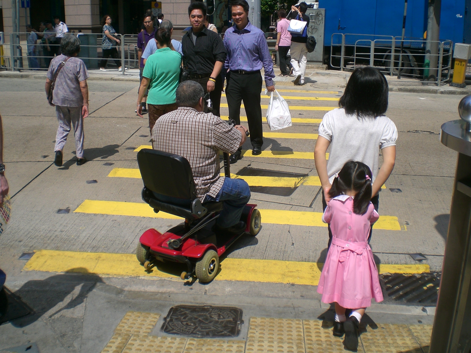 傷健zh:電動車仔代步過斑馬線